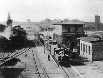 ehemaliger Bahnhof am Klosterthor nach 1885 (abgerissen 1906). Das Gelände liegt im heutigen Stadtteil Hamburg-Klostertor